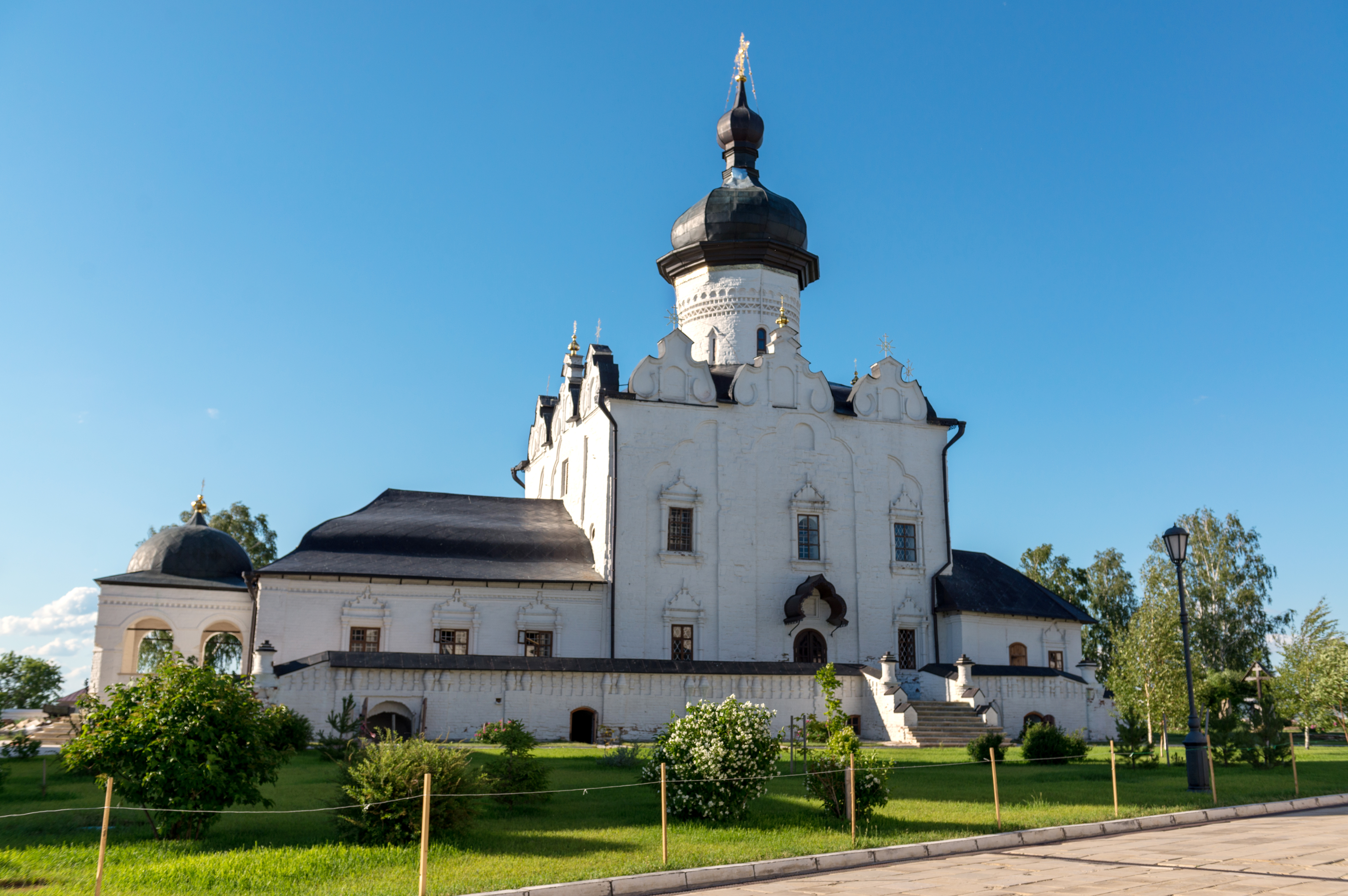 Успенский собор: Свияжск, Зеленодольский район, Татарстан